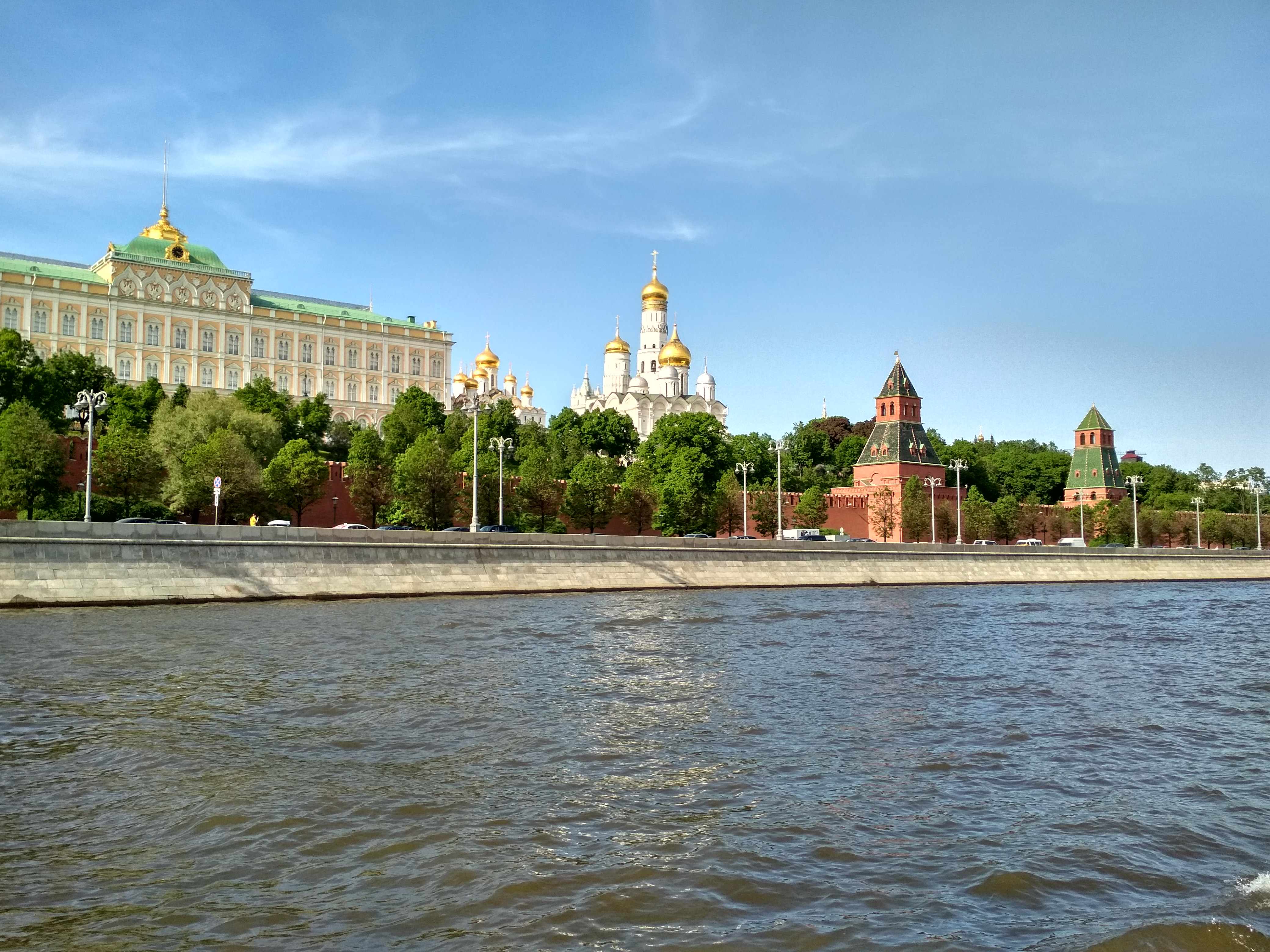 Moscow River near the Kremlin walls